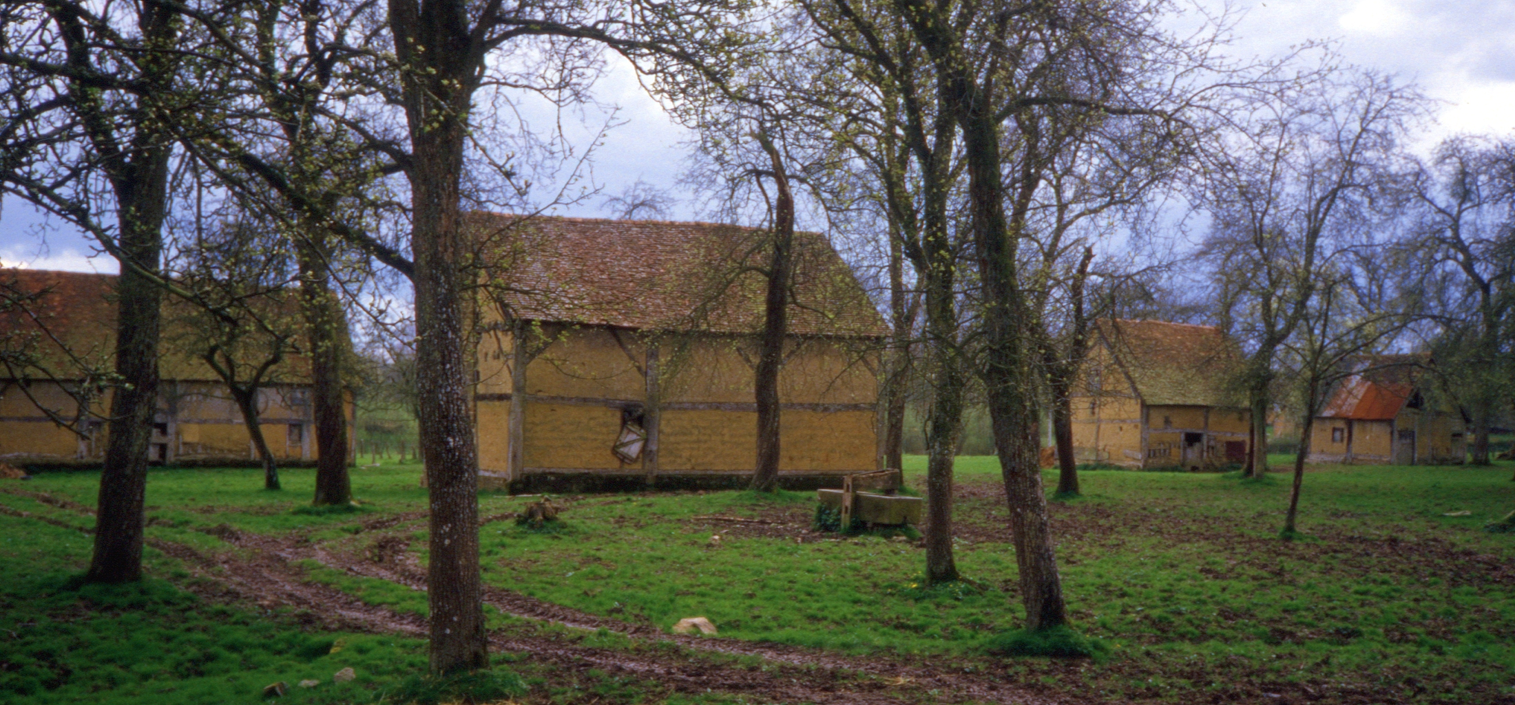 Bâtiments à colombages d'une ferme en pays d'Houlme (Orne).